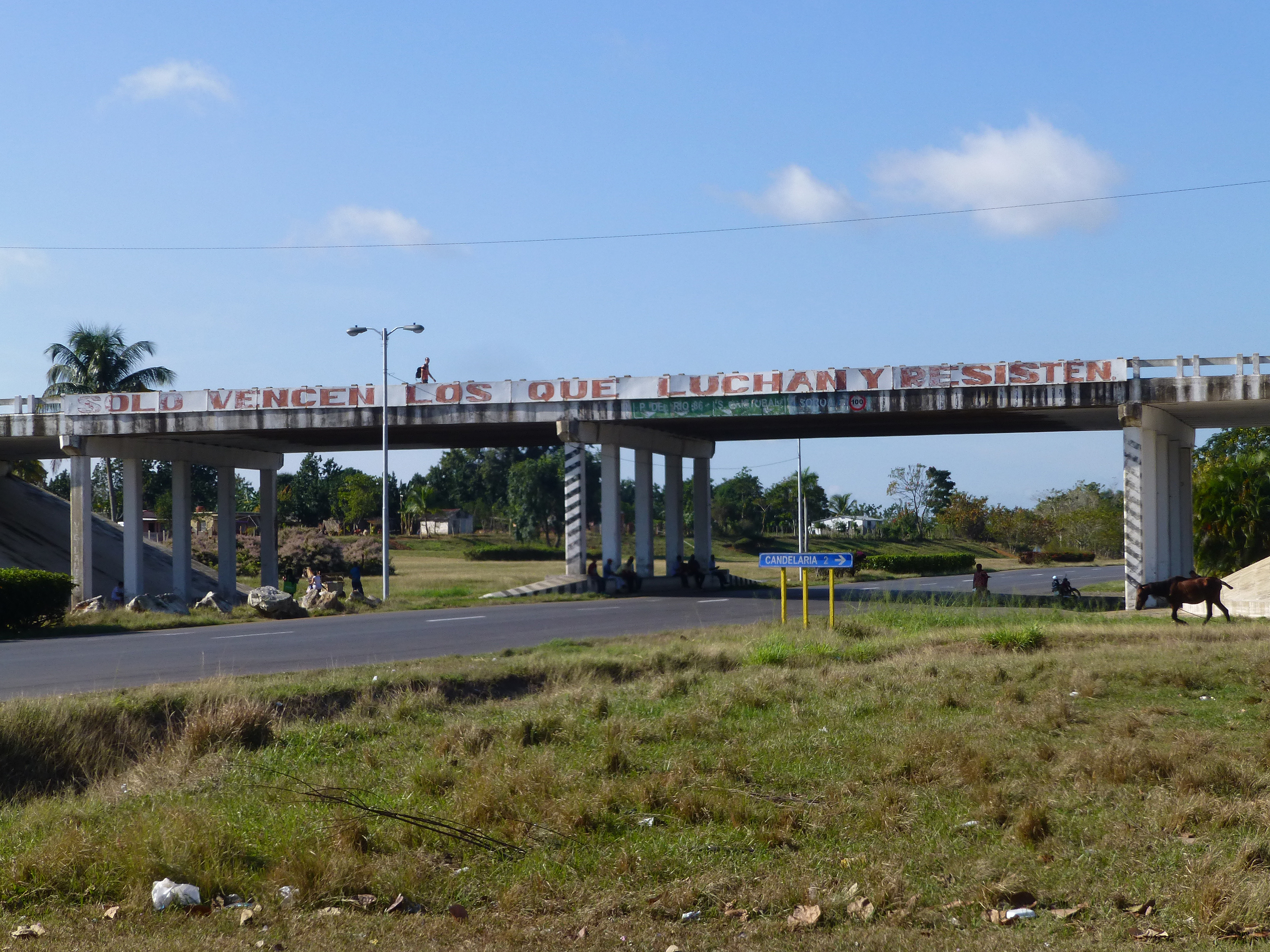 Candelaria, Province d'Artemisa (Cuba) : slogan révolutionnaire sur un pont ("Seuls sont victorieux ceux qui luttent et résistent"